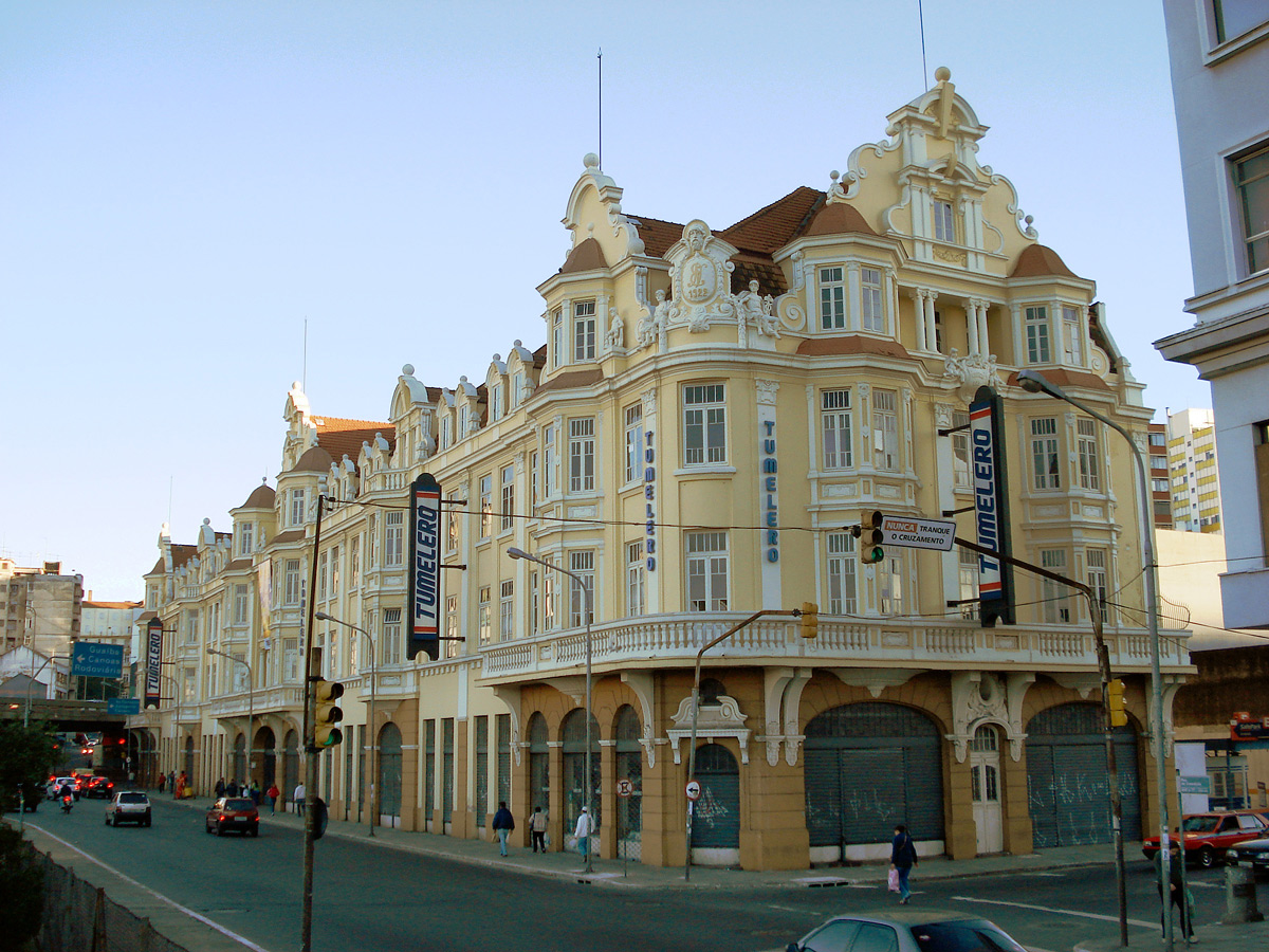 Edifício Ely, Porto Alegre, Brasil. Obra de Theodor Wiederspahn